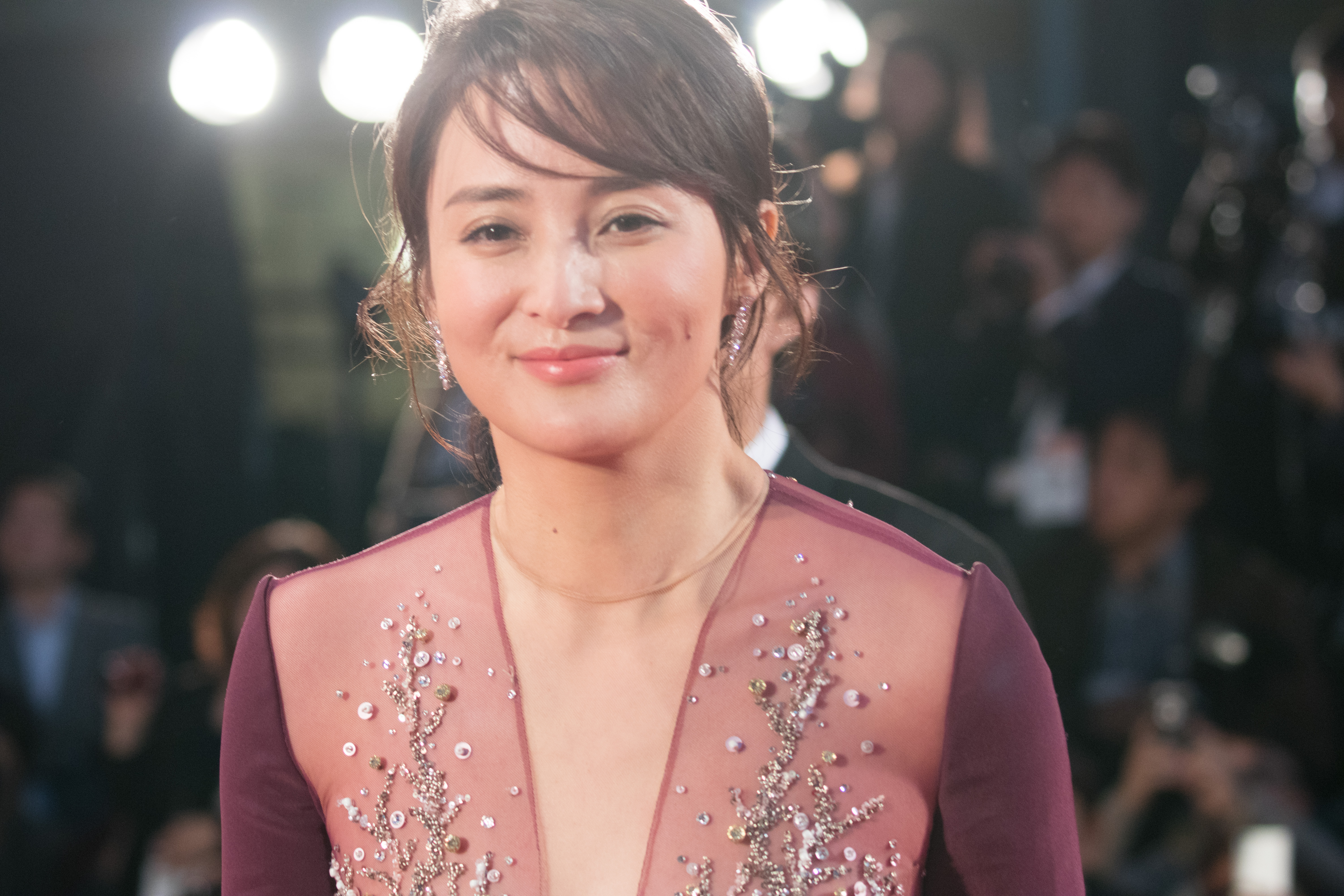 第29回 東京国際映画祭 オープニングセレモニー 蒋勤勤 (東京・中国映画週間)